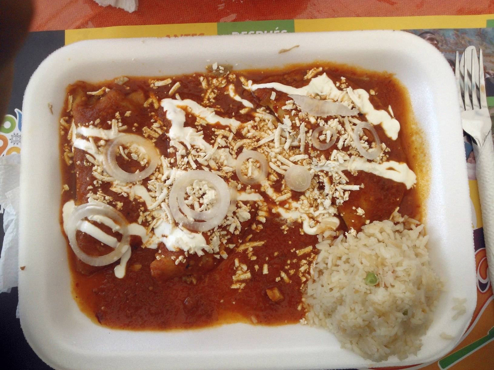 Fotografía de enchiladas rellenas de carnitas de cerdo con salsa roja tipo torta ahogada dentro del Festival turístico y gastronómico de la Enchilada, que se llevó a cabo en el Jardín Cuitláhuac, en la delegación Iztapalapa.